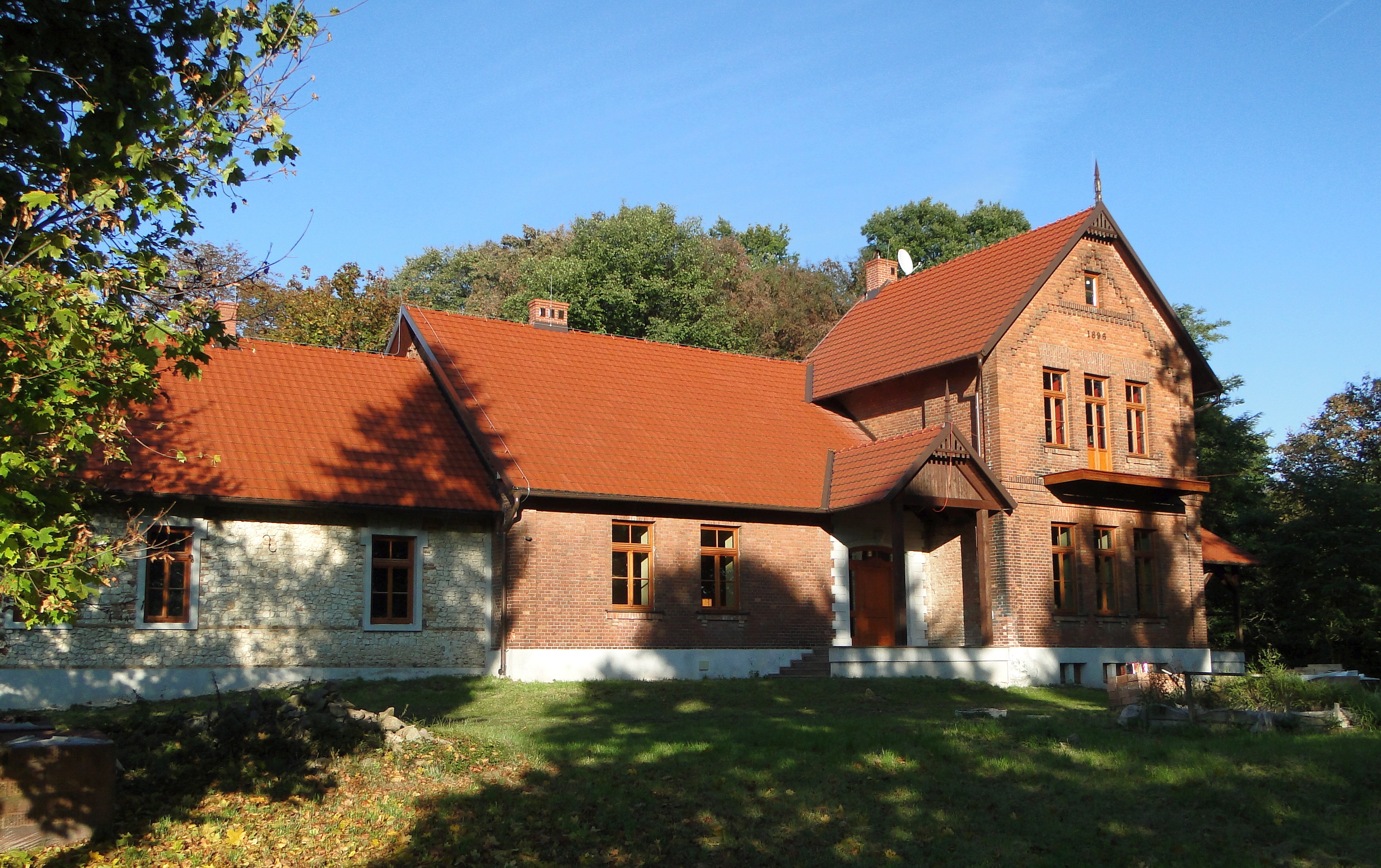 Dwór w Książniczkach